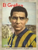 Francisco Rodrígues